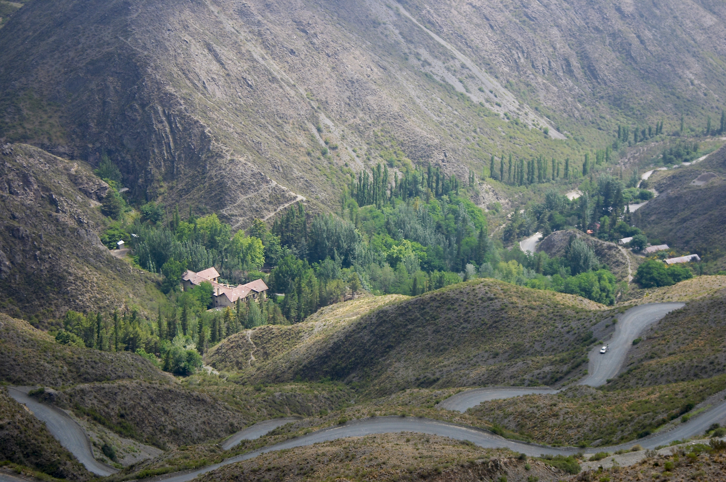 Camino de Caracoles de Villavicencio, donde se ve el Hotel Termas de Villavicencio, Provincia de Mendoza, Argentina.